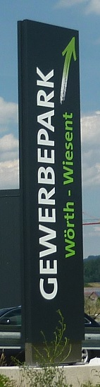 Logo Gewerbepark Wörth - Wiesent